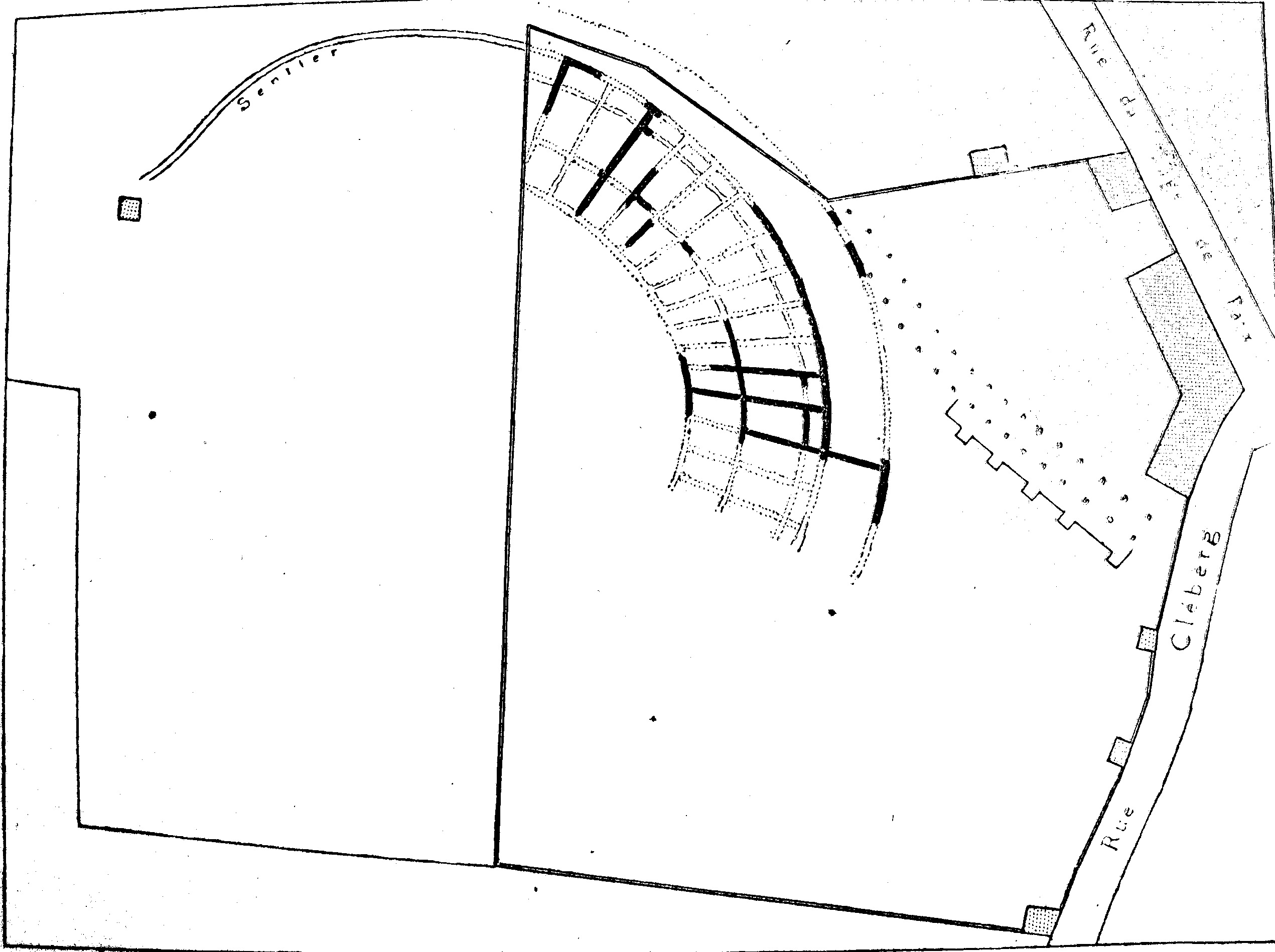 Plan des sous-structures du théâtre antique de Lyon situées dans le clos Lafon (en noir murs observés, en pointillé tracés extrapolés. Publié par André Steyert. A gauche, sentier dans le clos de la Compassion, non sondé